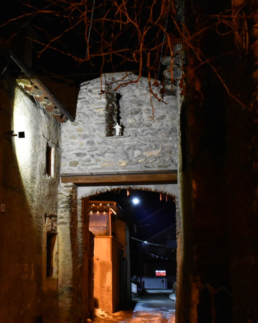 L'arco d'entrata dei Giusti di Traduerivi Susa